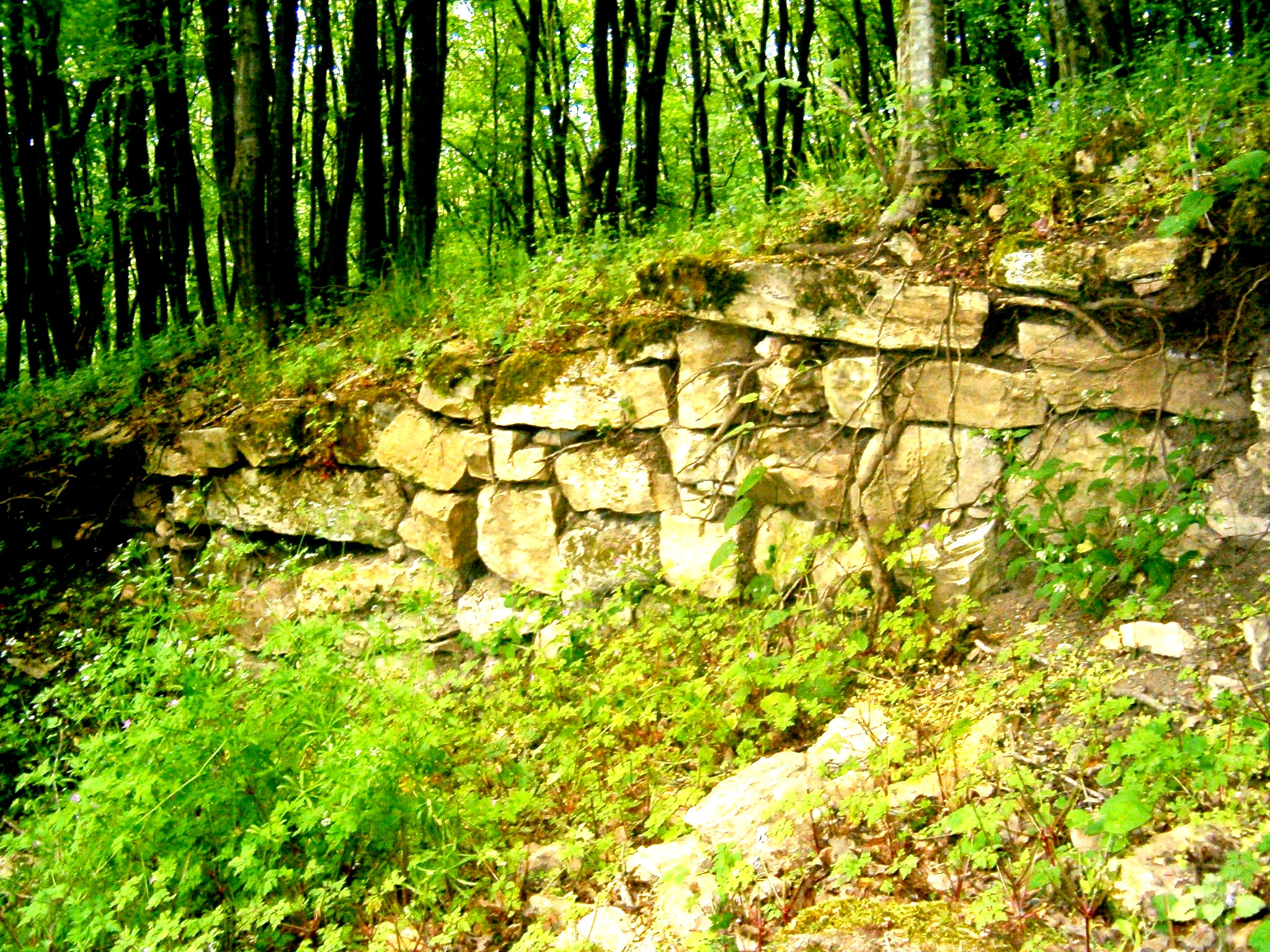 Разкрит от иманяри участък от руините на крепостната стена на Голямото кале (Буюк кале) при село Крепча, Опаченско